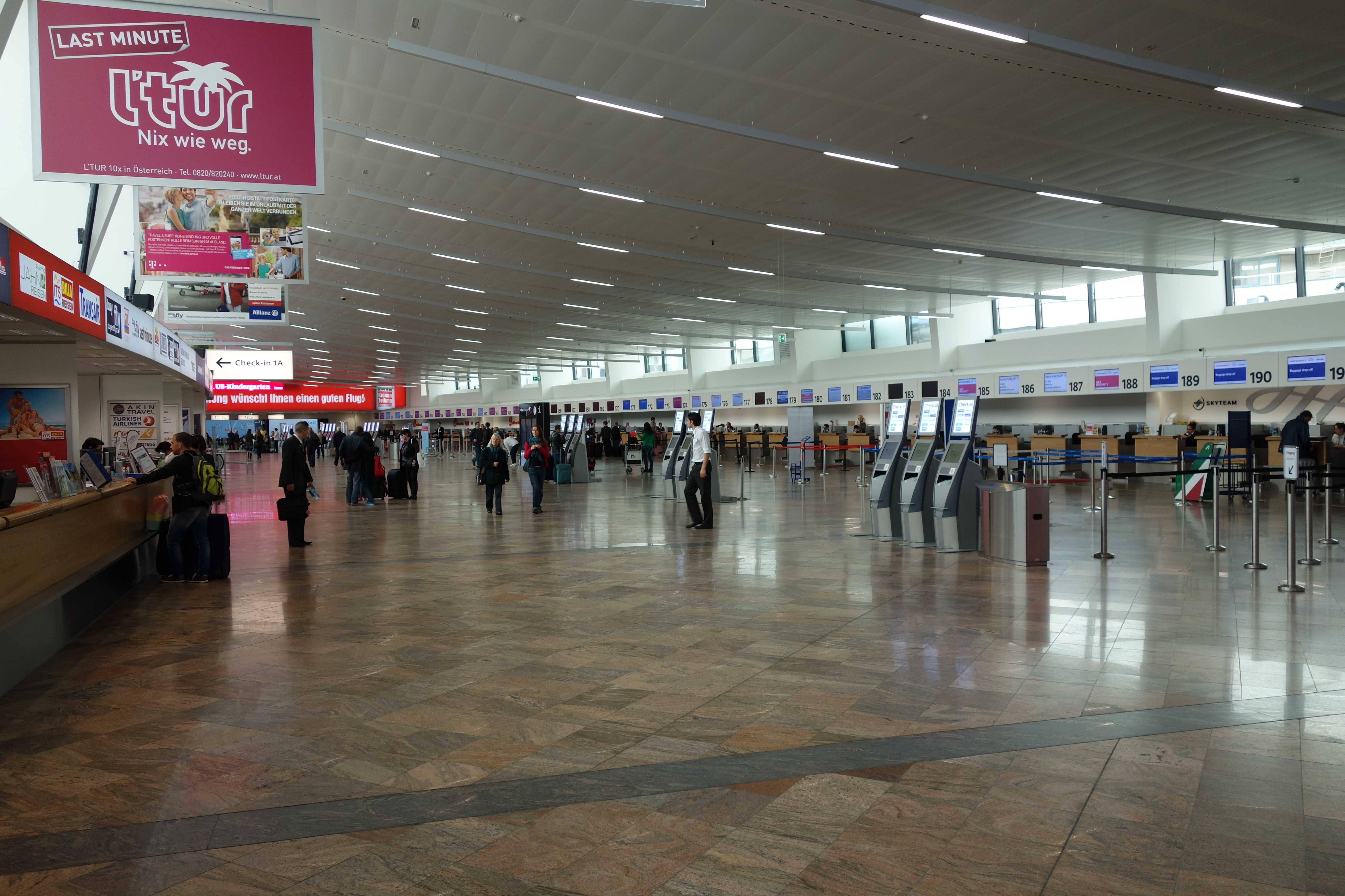 Ansicht des fertig umgebauten Check-in 1 im April 2014.